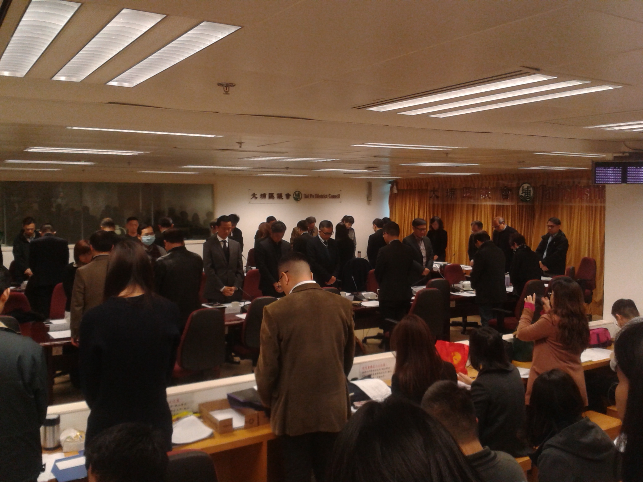 大埔區議會就大埔公路雙層巴士翻側事故，於2018年2月12日舉行特別會議，各與會者於會前默哀致意。